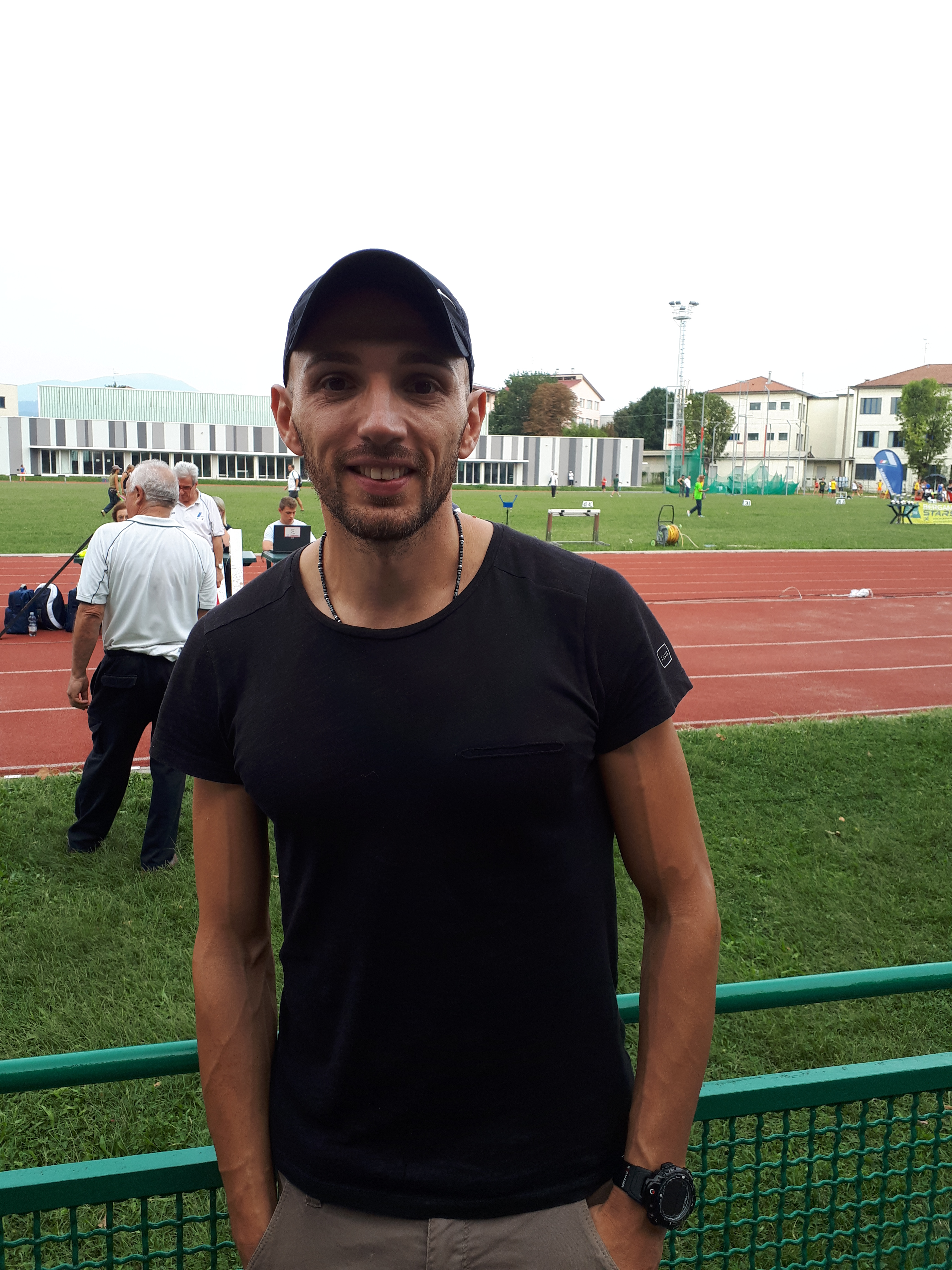 Il triplista italiano Fabrizio Schembri a Bergamo il 16 settembre 2018